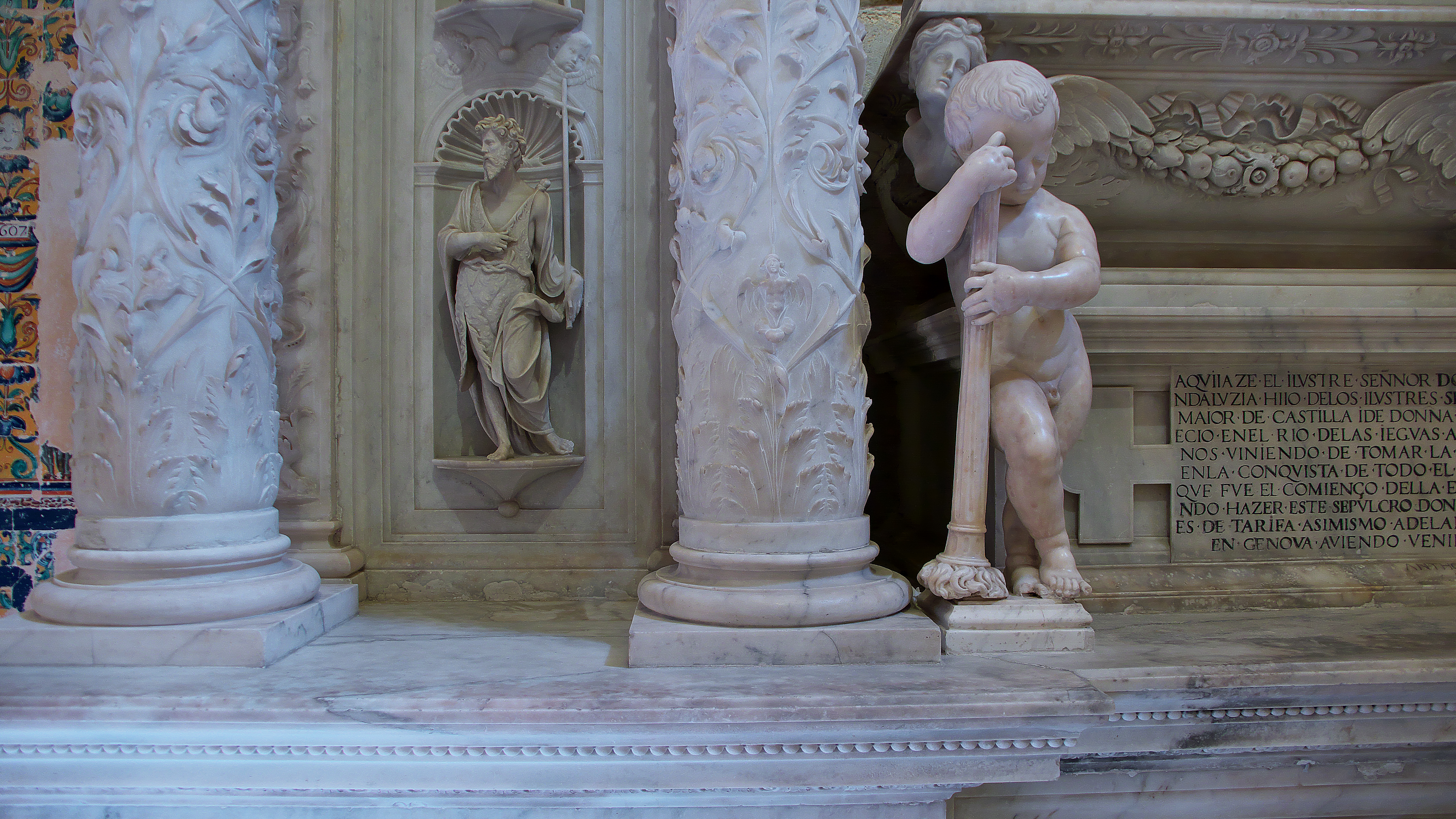 Detalle del sepulcro de Pedro Enríquez de Quiñones, realizado por el lombardo Antonio María Aprile de Carona en 1522.